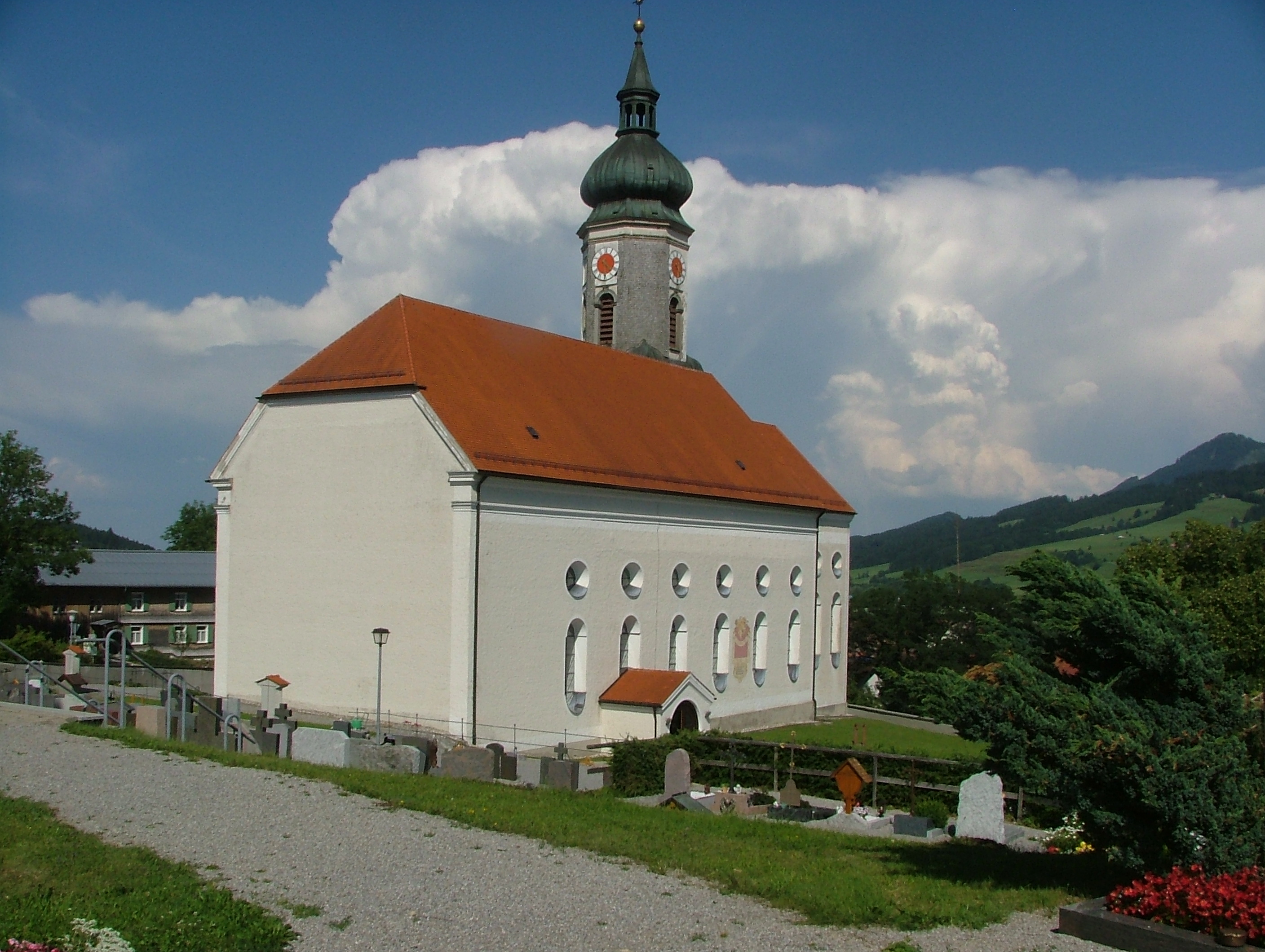 Wertach